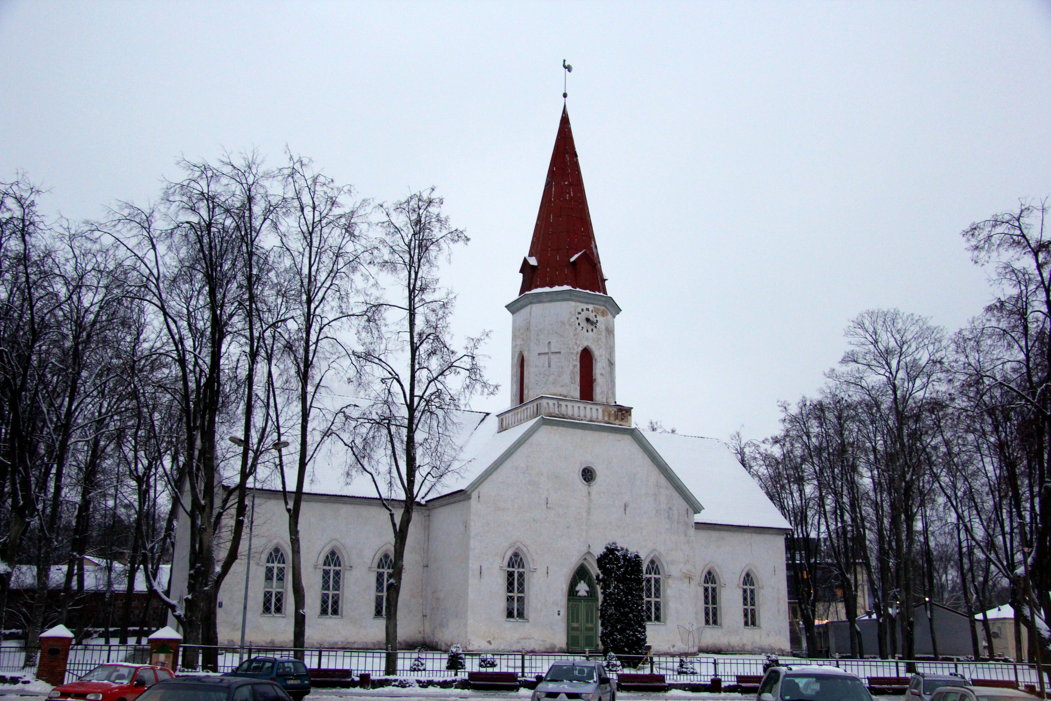 Smiltenes baznīca